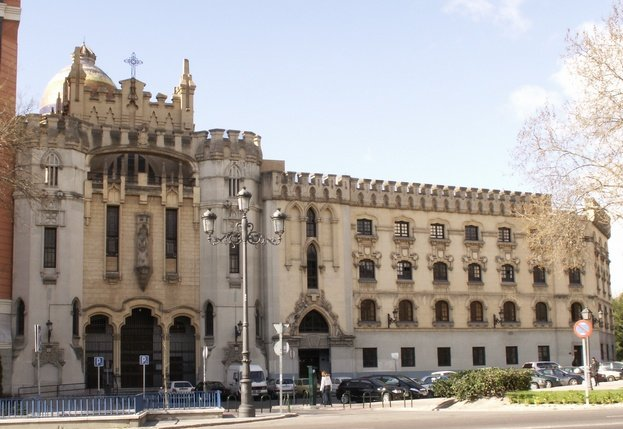 Iglesia de Santa Teresa de Jesús y Convento de los Padres Carmelitas Descalzos, en Madrid (España). Plaza de España, 13. Construido entre 1923 y 1928. Arquitecto: Jesús Carrasco Muñoz. Incendiada el 11 de mayo de 1931.